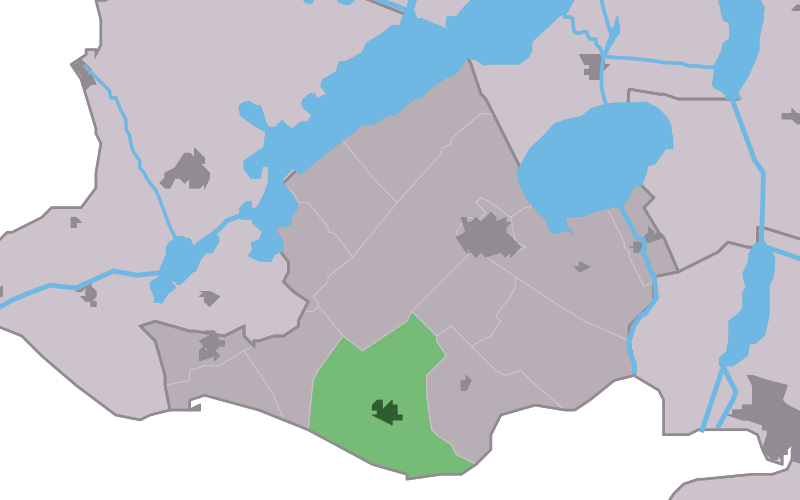 Kaartsje fan himrik fan Aldemardum